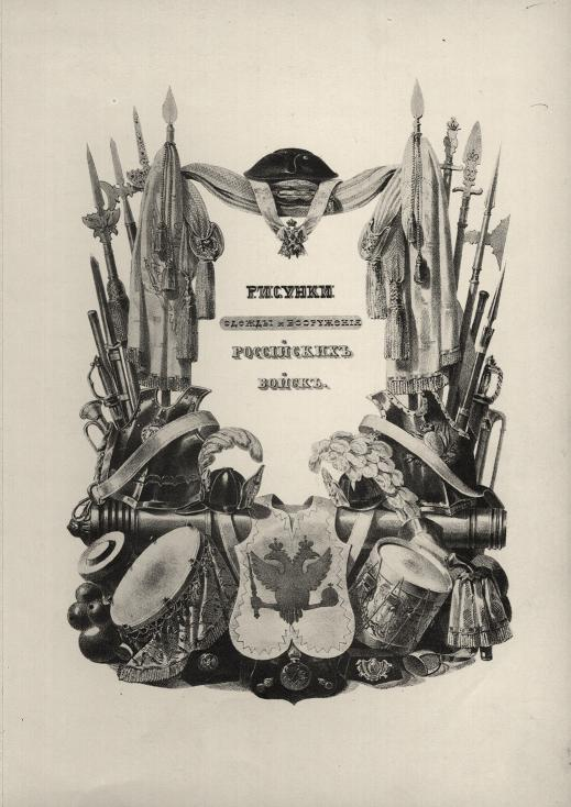 Титульный лист.